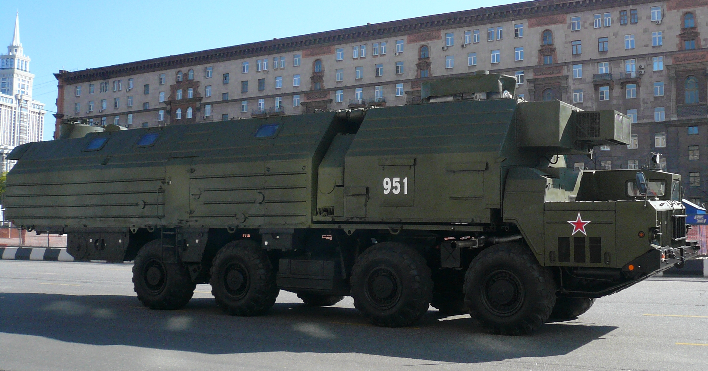 Вероятно, машина обеспечения боевого дежурства (15В231) комплекса "Тополь-М" на шасси МАЗ-543М на Параде Победы